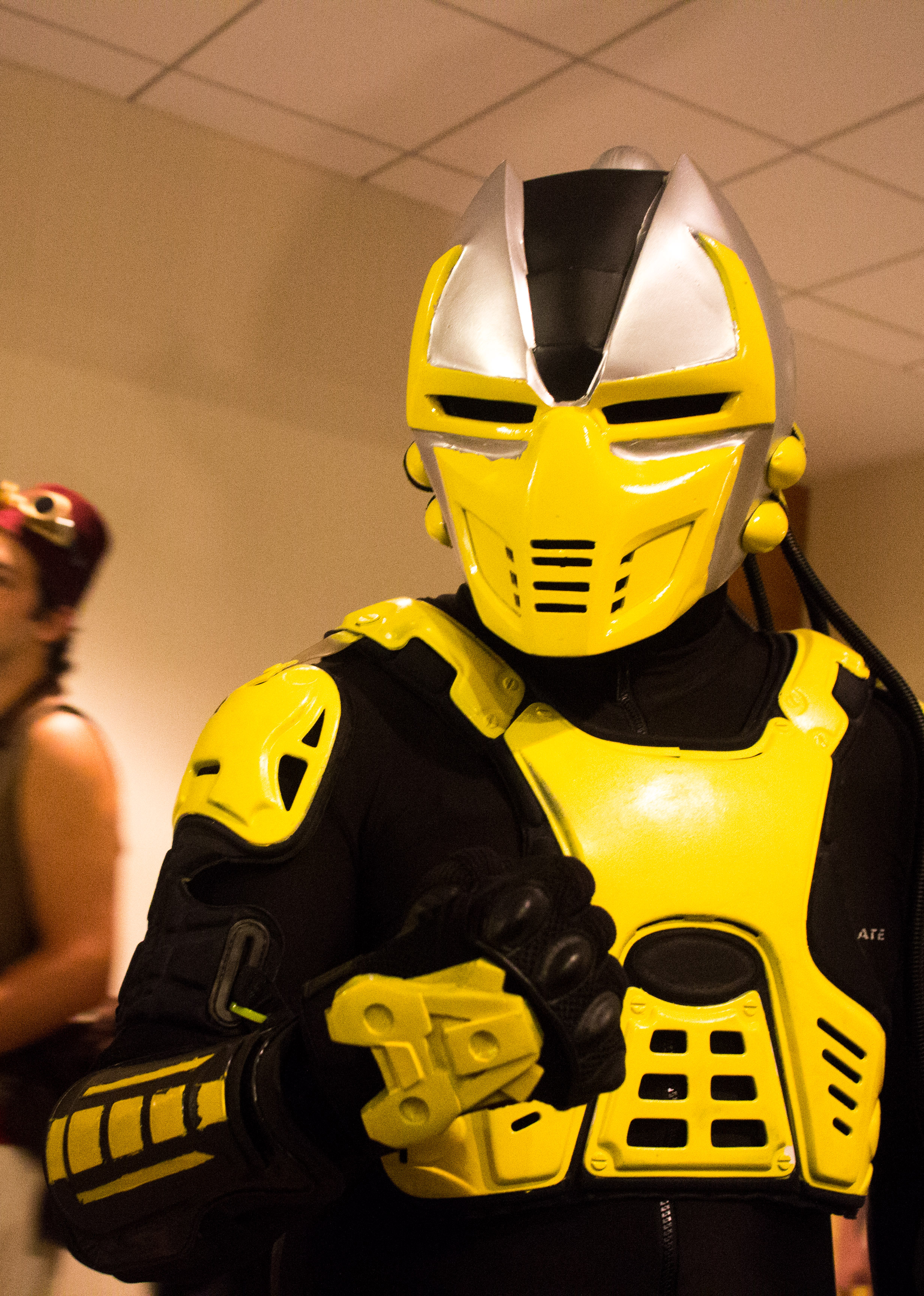 Cosplay at Dragon*Con 2013.